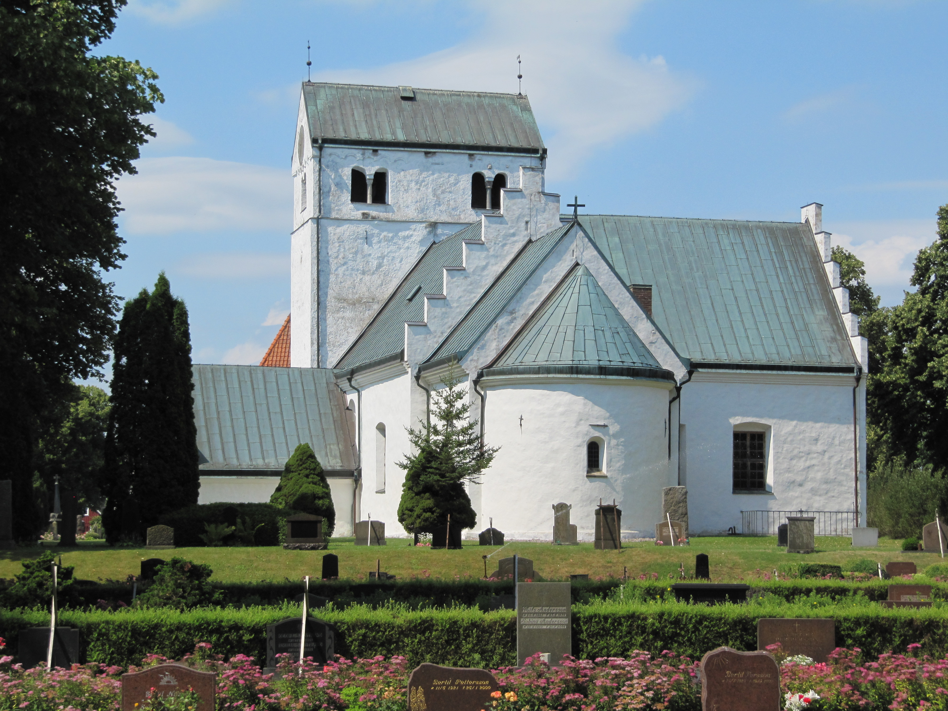 Fjälkinge kyrka från öster